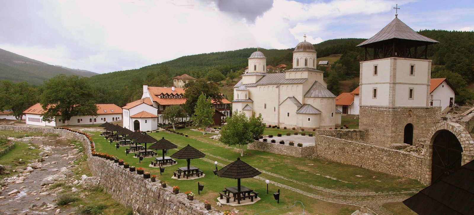 Манастир Милешева, поглед са мостића над Милешевком на манастир, звоник, двориште и помоћне објекте Игор Ирић, , FujiFilm S5500